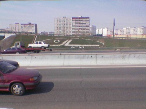 Нулевой километр Московской кольцевой автомобильной дороги (МКАД). Восточная сторона.